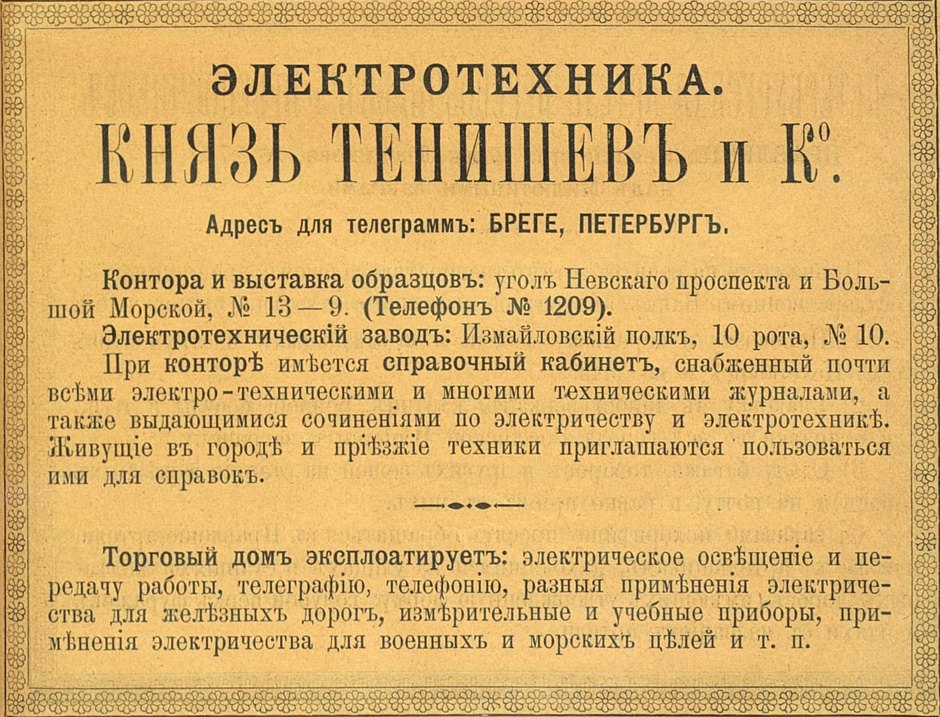 Реклама электротехнической компании князя В. Н. Тенишева, 1894 год.